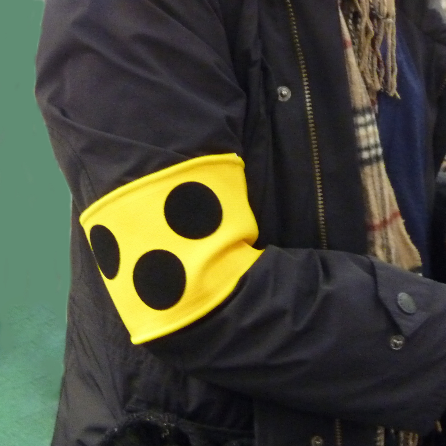 Blindenarmbinde